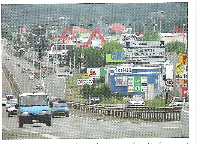 Description grande zone industrielle de la chapelle saint aubin DateJune 2007SourceSelf-photographedAuthorfantassin 72Permission (Reusing this file) libre de droits grande zone industrielle de la chapelle saint aubin